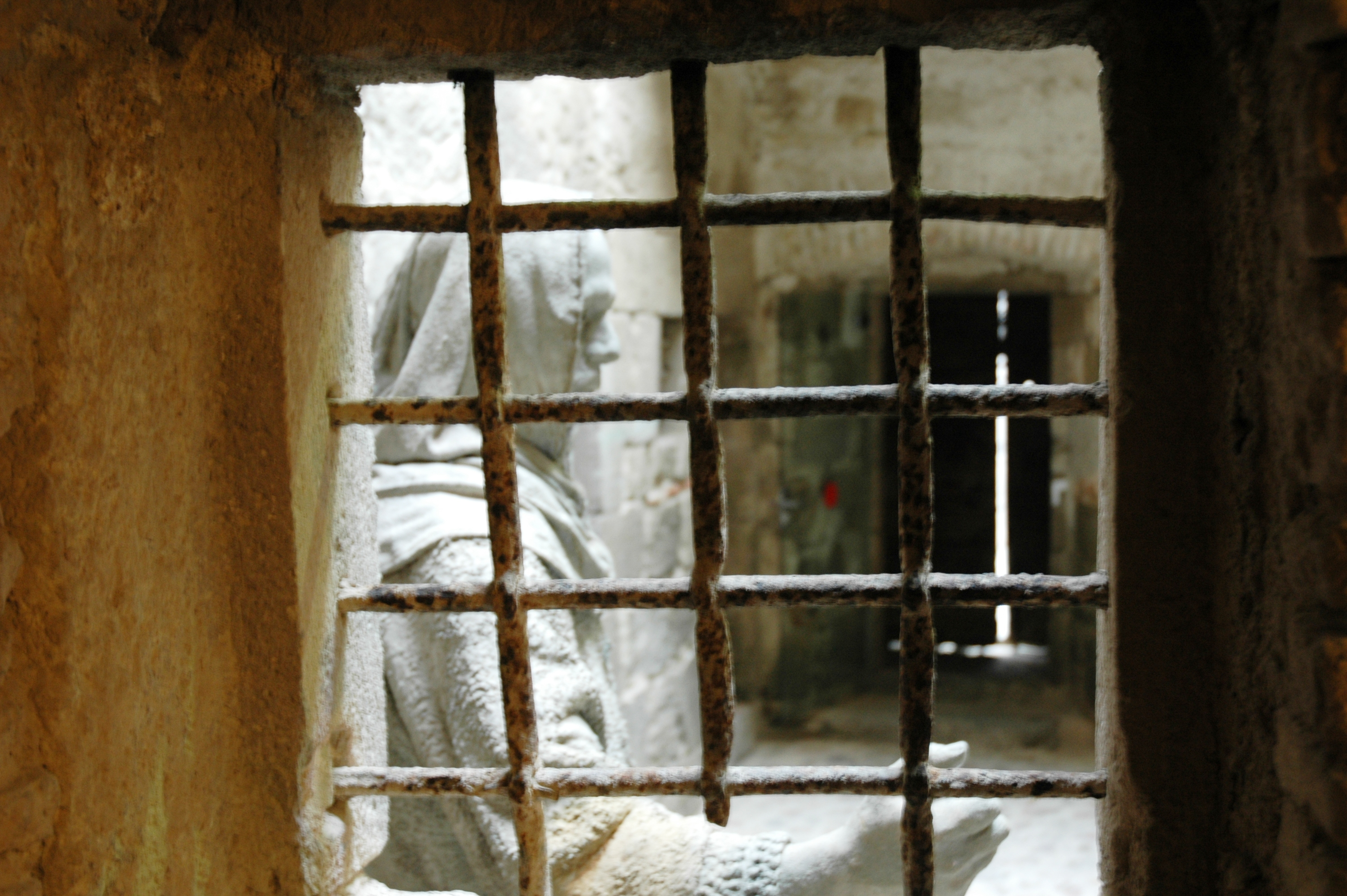 Castelló d'Empúries - Presó